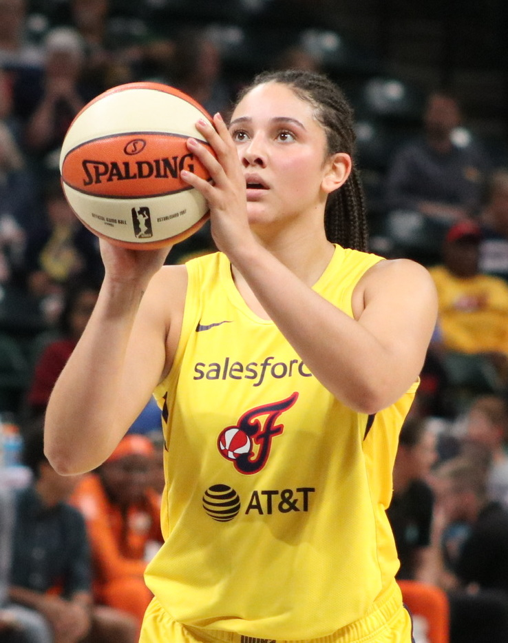 P090819AZS